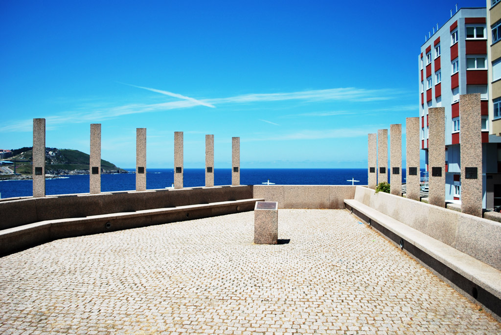 Balcón Balmis na casa do home da Coruña, homenaxe ás persoas da expedición